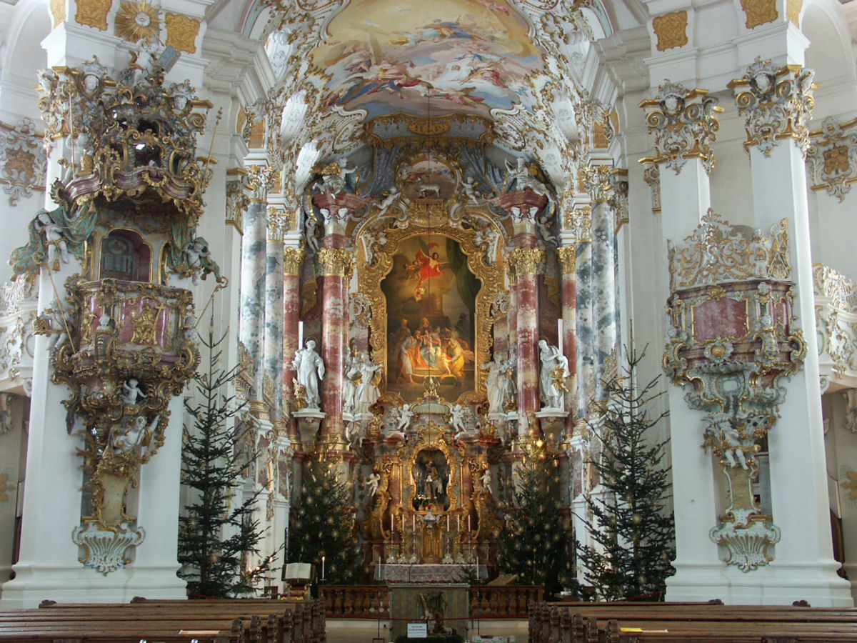 Wies church (Wieskirche), Germany